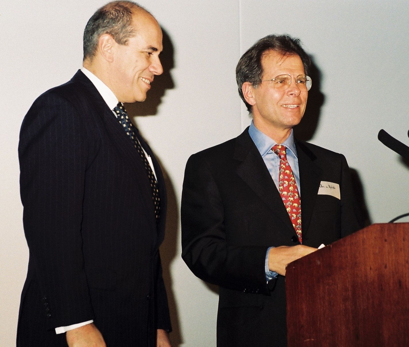 Christian von Holst und Wilhelm Rall 1998 beim Practice Day von McKinsey & Company in Düsseldorf